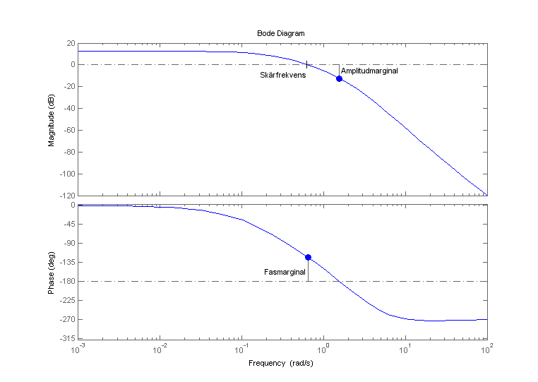 Skärfrekvens, amplitud- och frekvensmarginal i bodediagram.